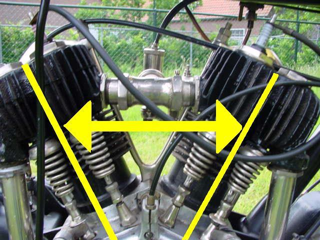 De blokhoek is de hoek tussen de cilinders van een V-motor of een W-motor.